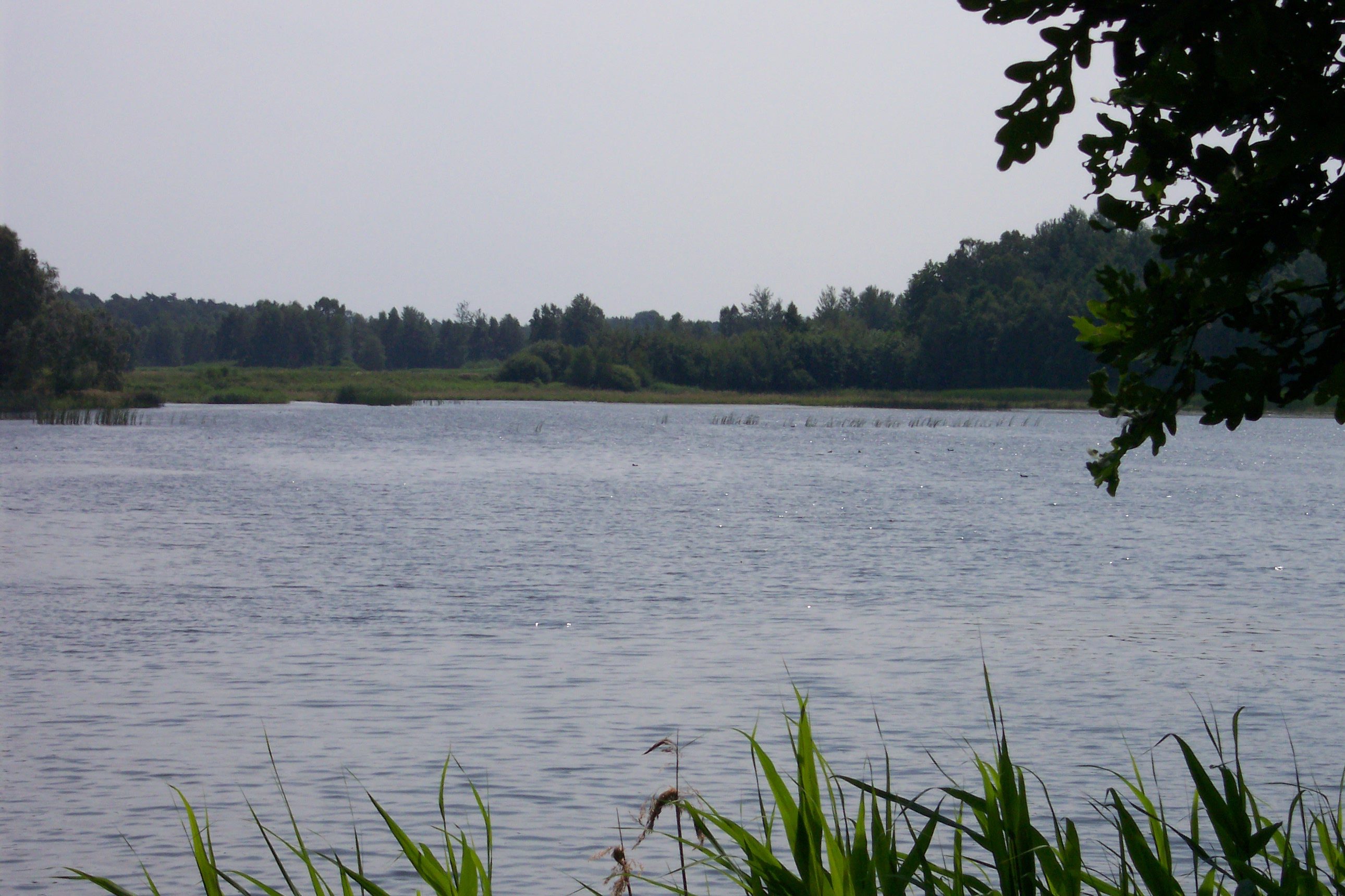 Jeden z kilku stawów hodowlanych w okolicach Gwoździan